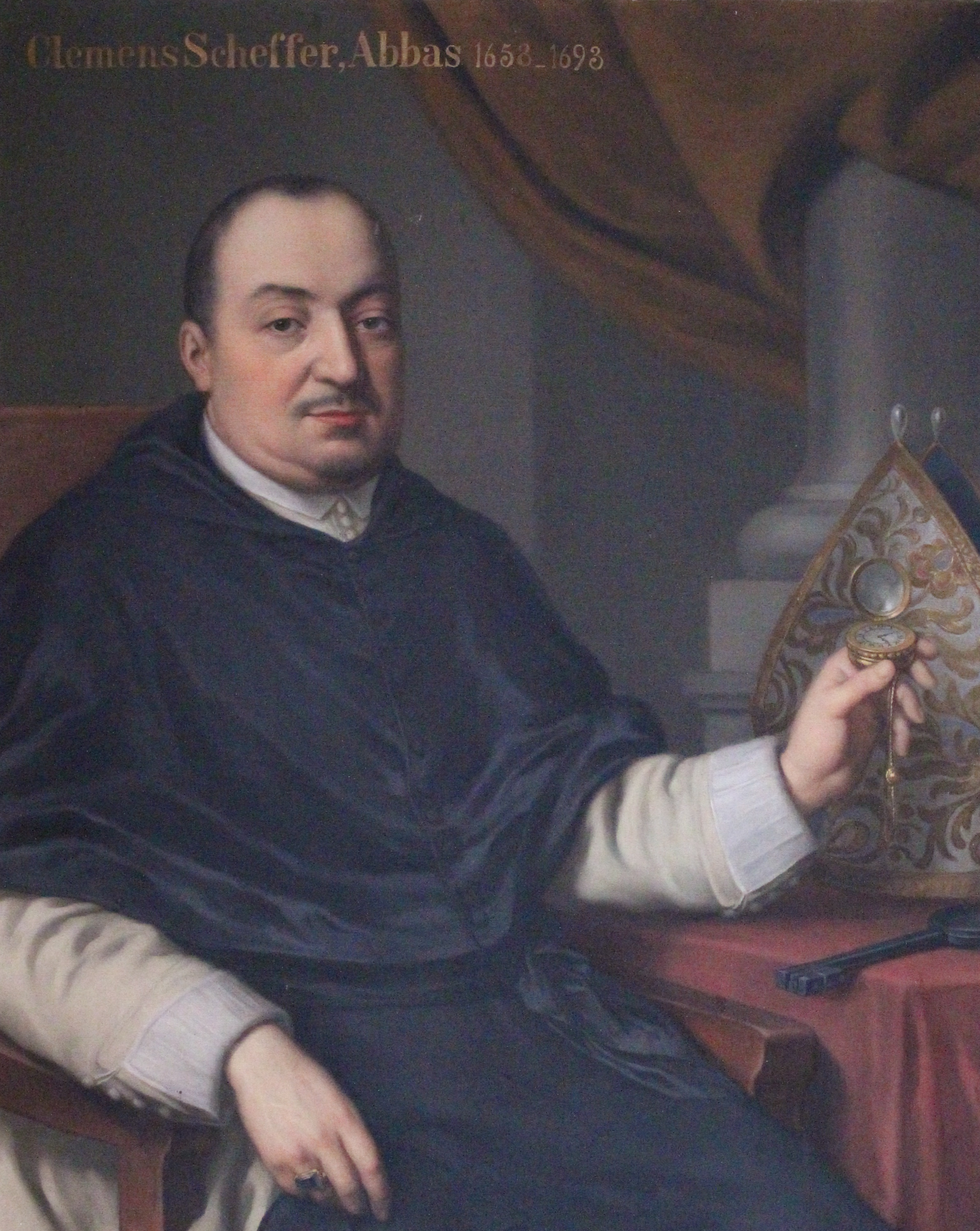 Porträt von Abt Clemens Schäffer (regierte 1658-1693) hängt in der Prälatur. Er wird "Secundus fundator" des Stiftes Heiligenkreuz genannt.